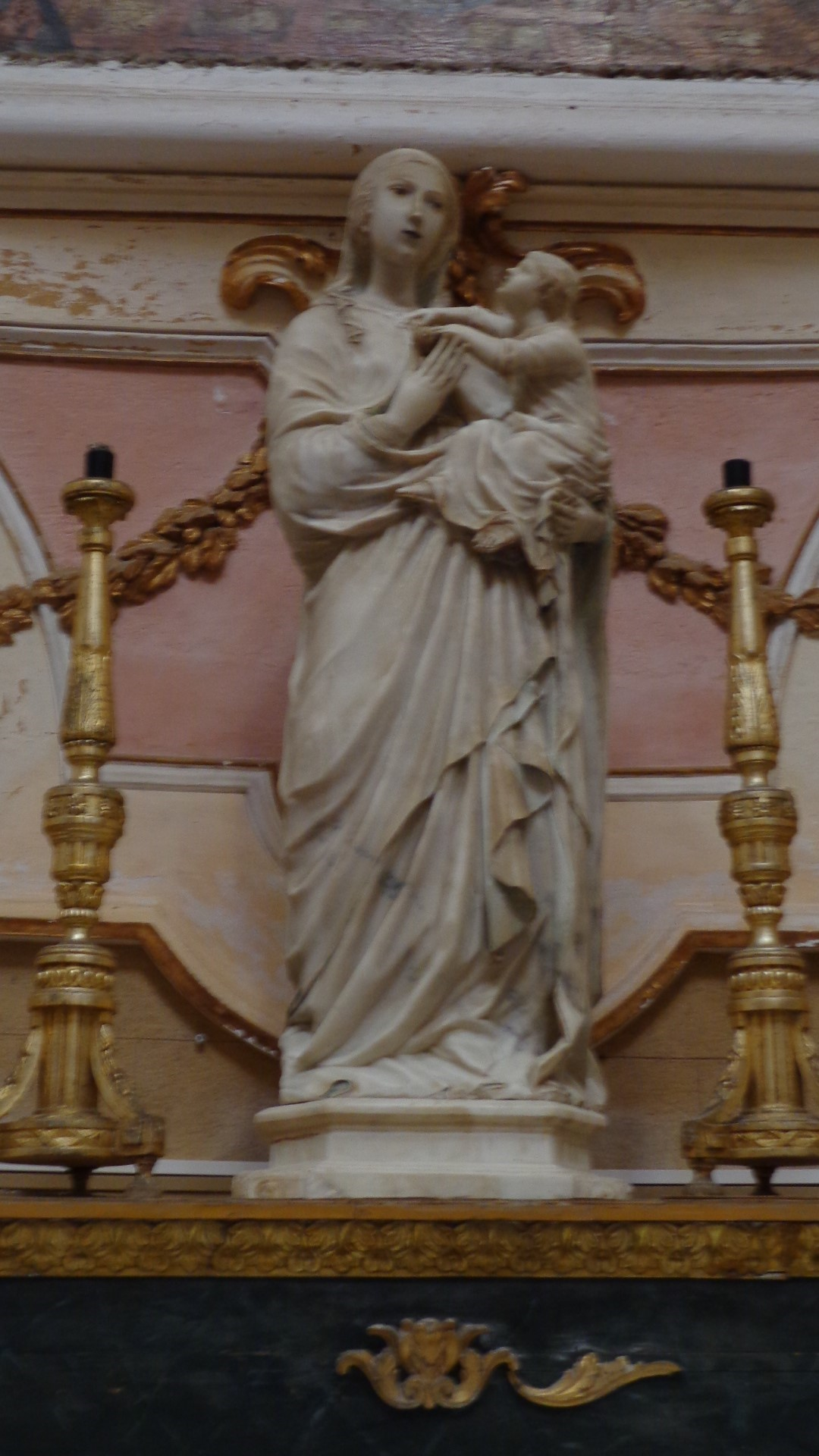 Scultura Vergine Maria